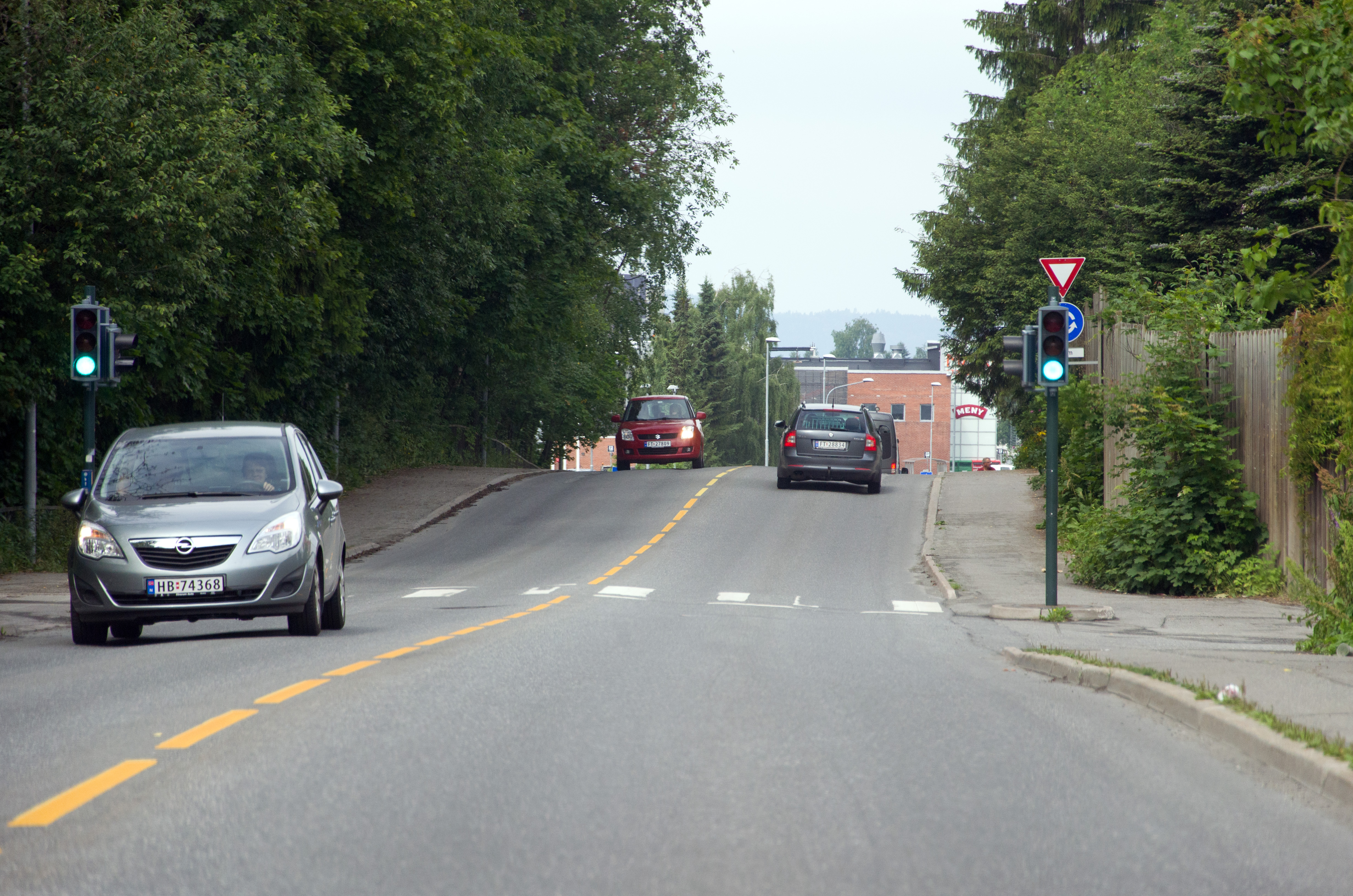 Fylkesvei 1758 (tidl. 79), Aslak Bolts gate i Hamar